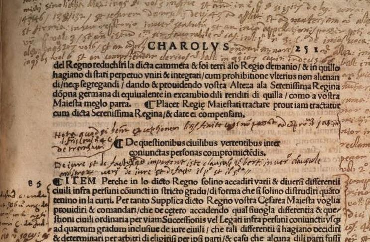 1526 Capitula Sicilia - Richiesta di Siracusa su Soppressione Camera Reginale a Carlo V